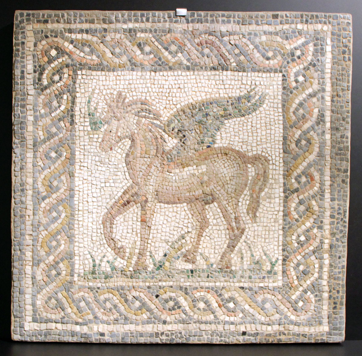 Pégase en mosaïque (environ 1m de côté). IIe s. Musée archéologique de Cordoue.